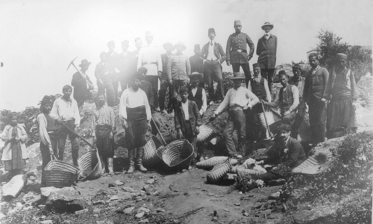 Ausgrabungen auf der Akropolis durch die École française d’Athènes im Jahre 1911